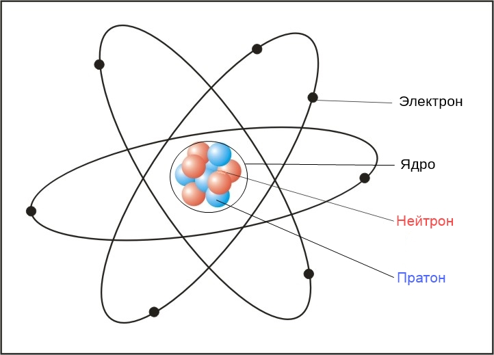 Прадстаўленне атама.